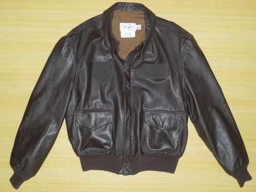 slika Cooper sportswear A-2 jakne rađene za potrebe američkog zrakoplovstva